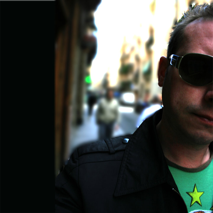 Morten Bundgaard Selmer